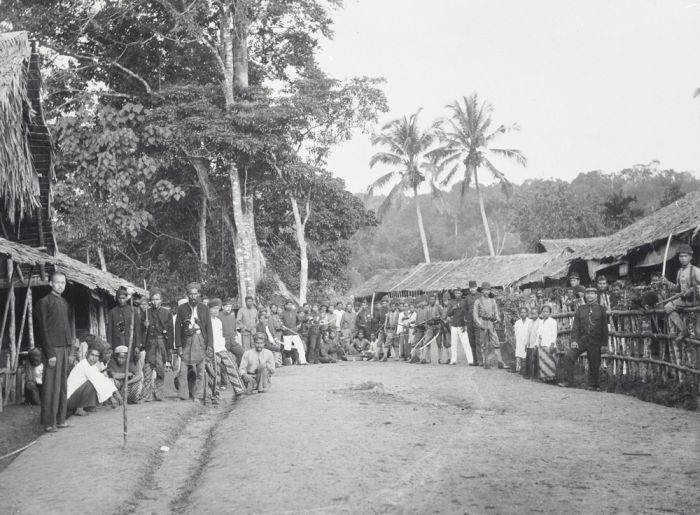 foto. Groepsportret bij bivak in Peudada, Atjeh